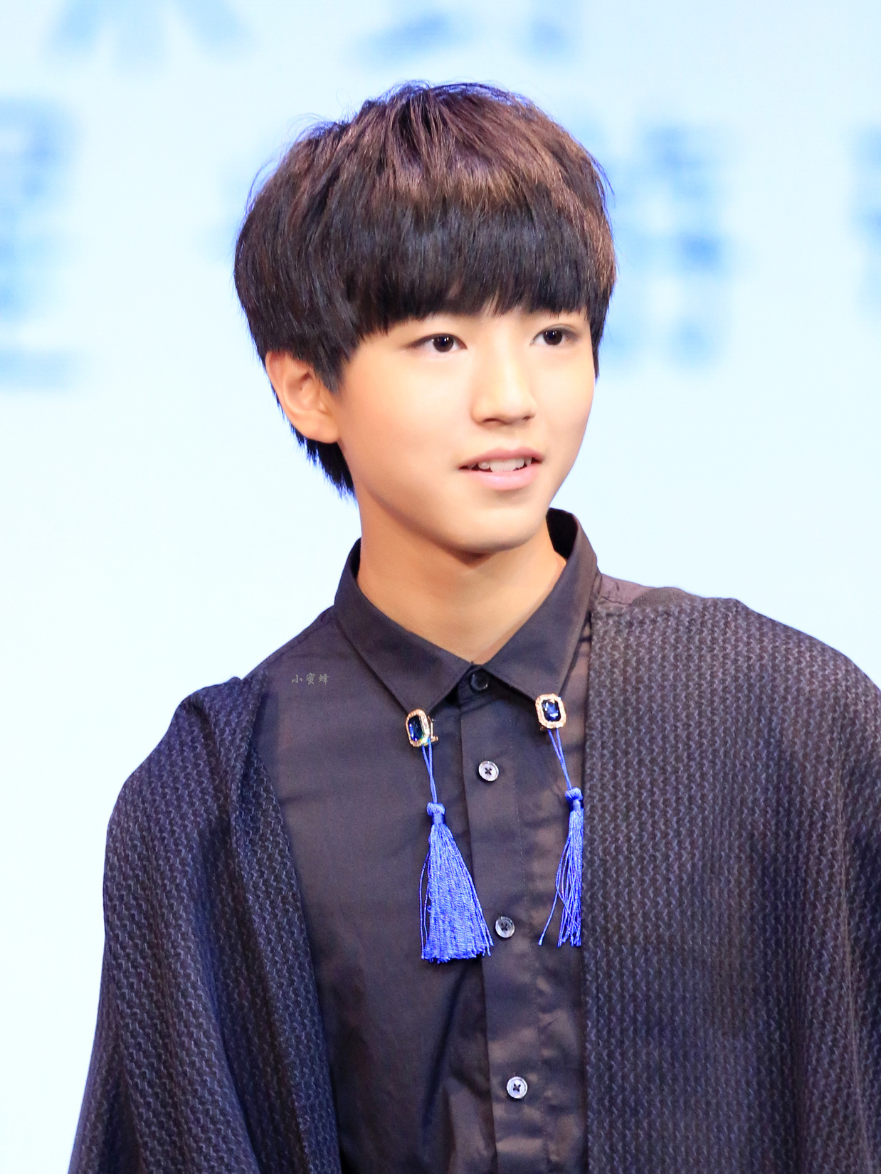 TFBOYS 王俊凯 (2015)